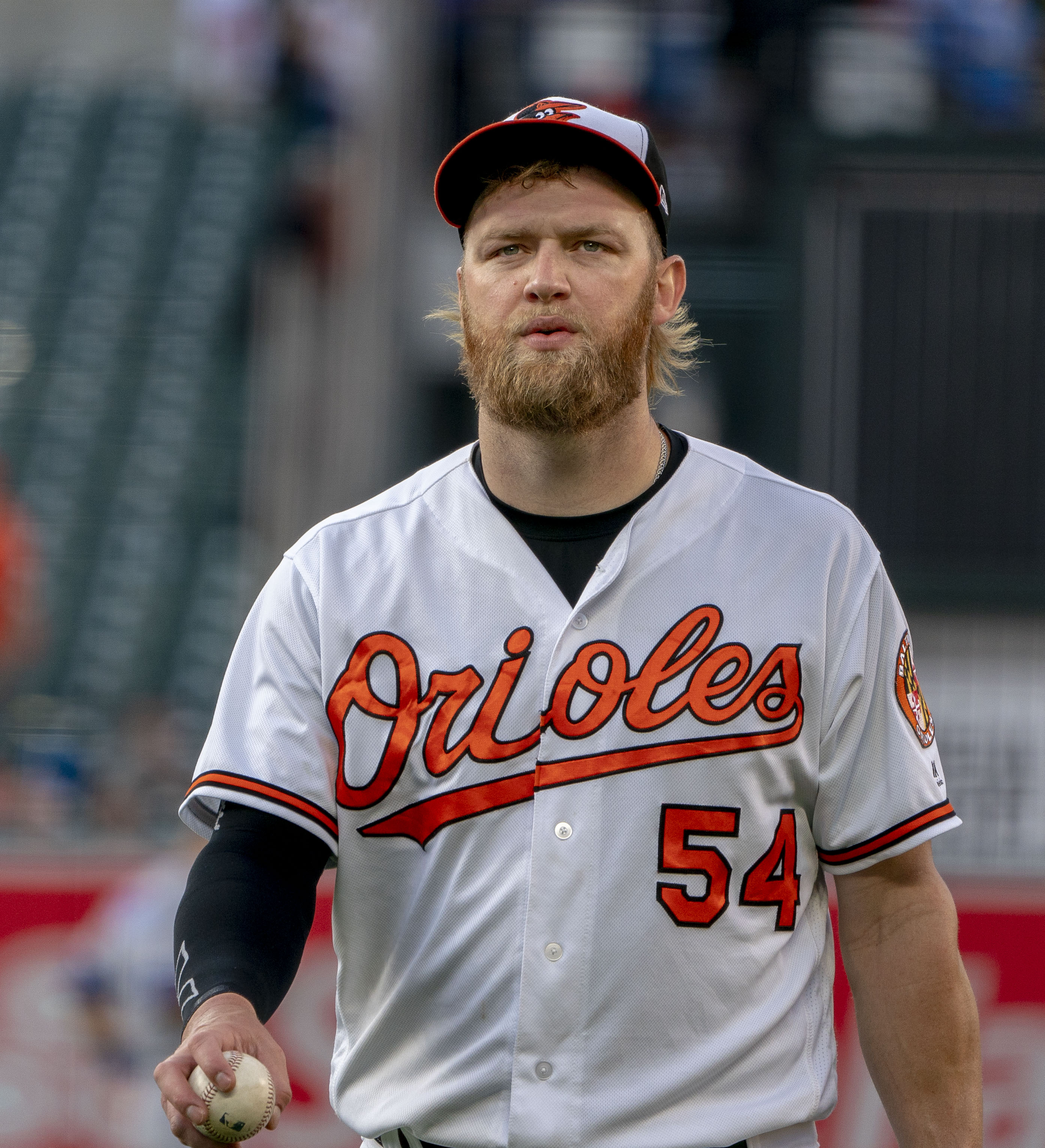 Royals at Orioles 5/9/18